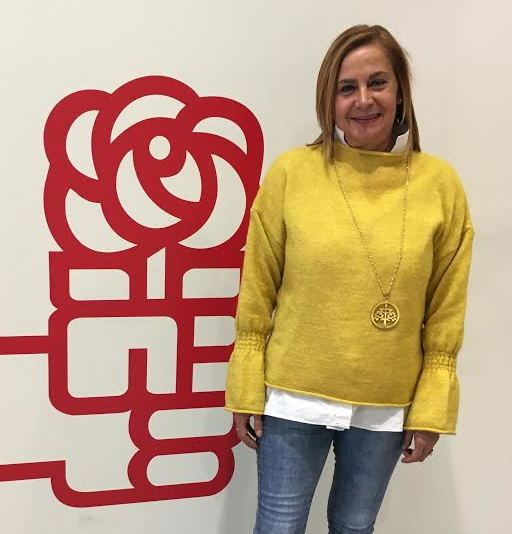 Madrid, 2017